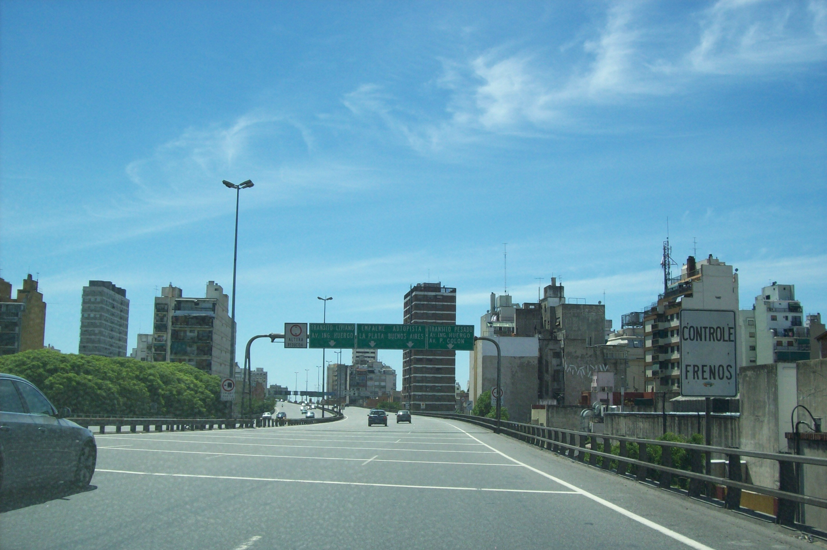 Autopista 25 de Mayo en el barrio de Constitución hacia el Este, Ciudad de Buenos Aires, Argentina.